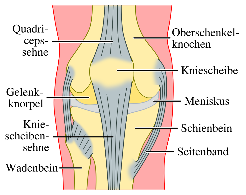 Vereinfachte Struktur des rechten Kniegelenks (Vorderansicht)